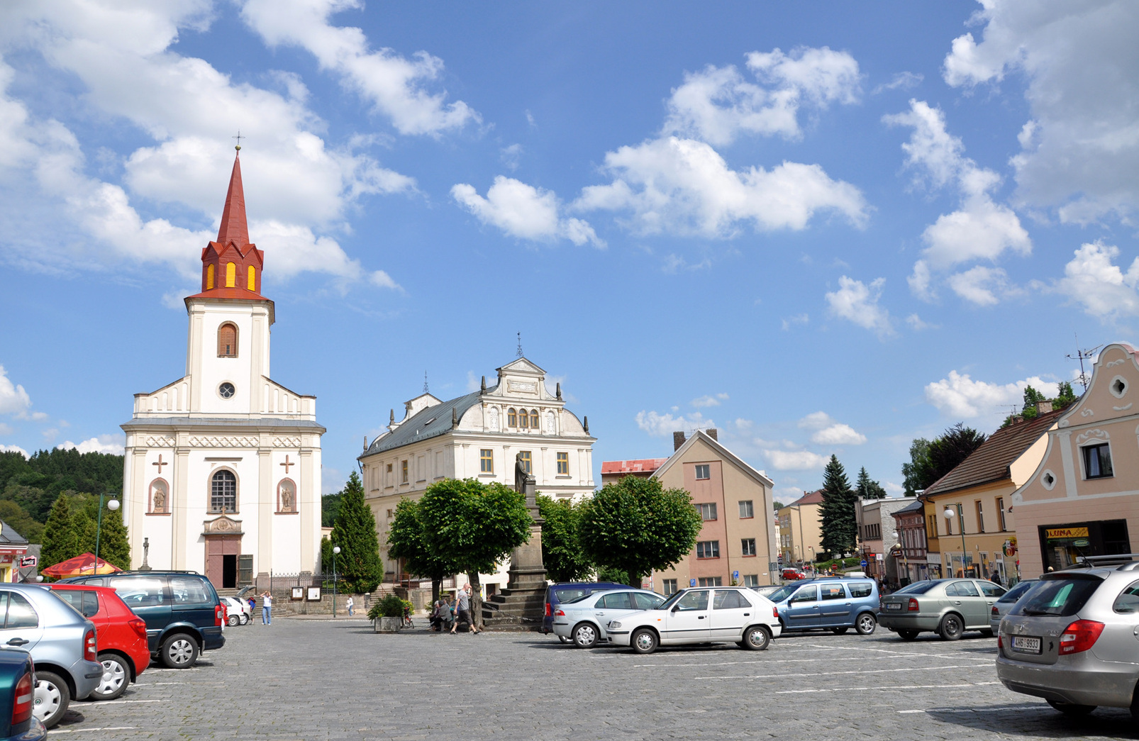 Náměstí v Nové Pace